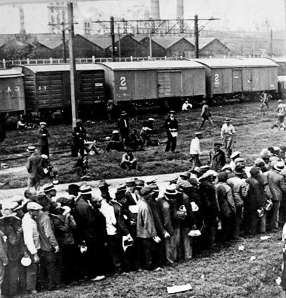 Desocupados en el puerto de Buenos Aires. Villa Desocupación en Retiro.